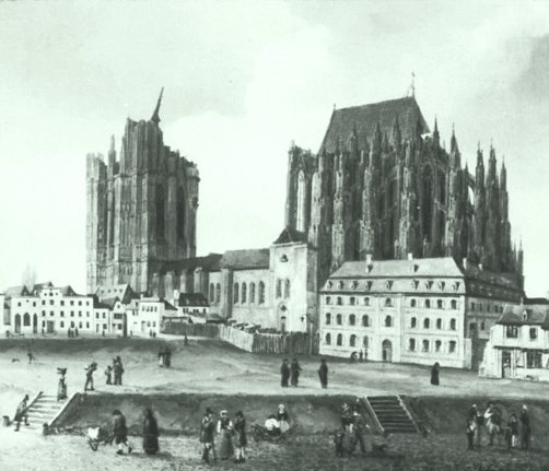 Kupferstich: Domplatte - Dom und Domhof von Südosten (1829)